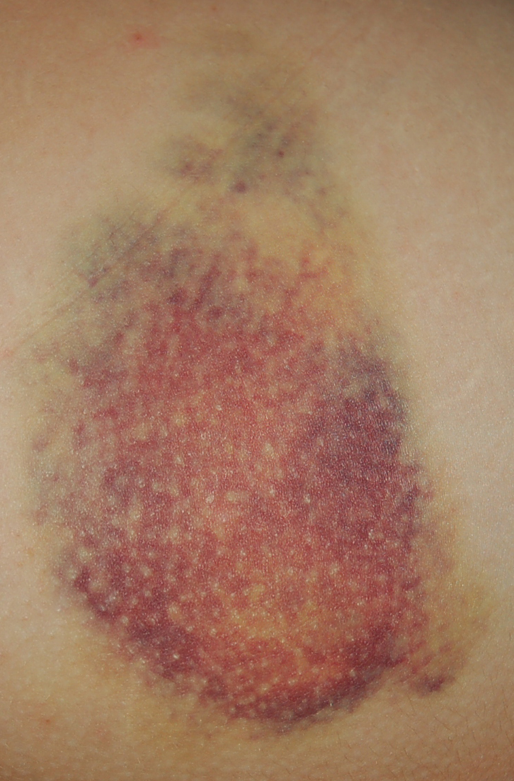 Hématome - Injurie